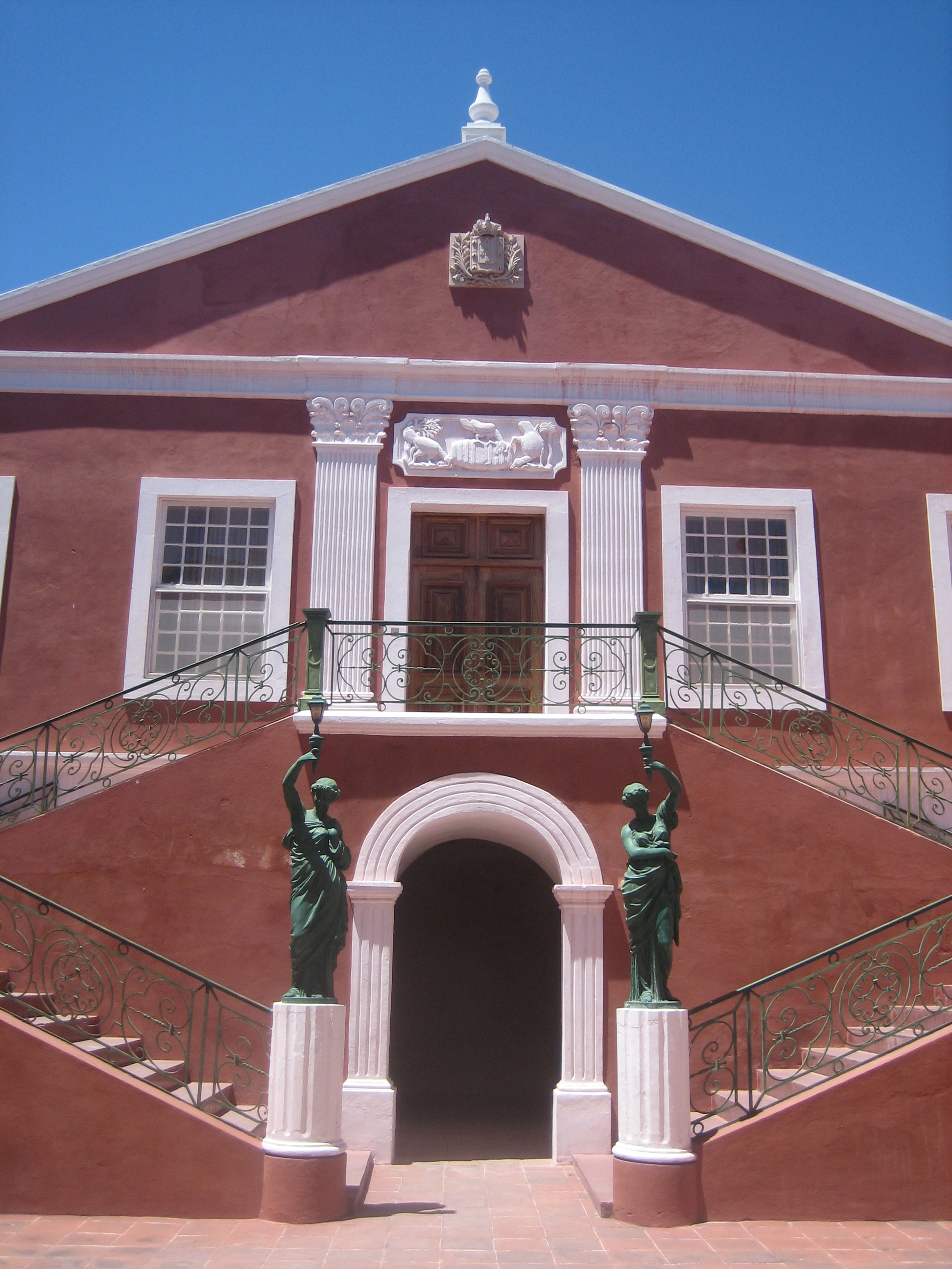 Governors Palace in Mozambique Island